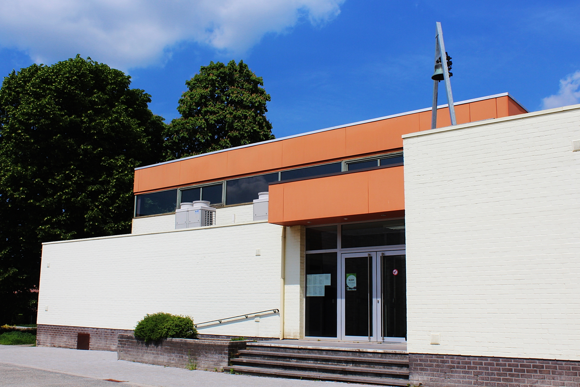 Modernistische kerk in Aarschot (Ourodenberg).